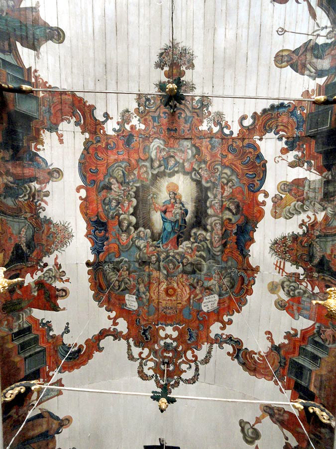 Catedral do Pilar - frontispício do altar-mor